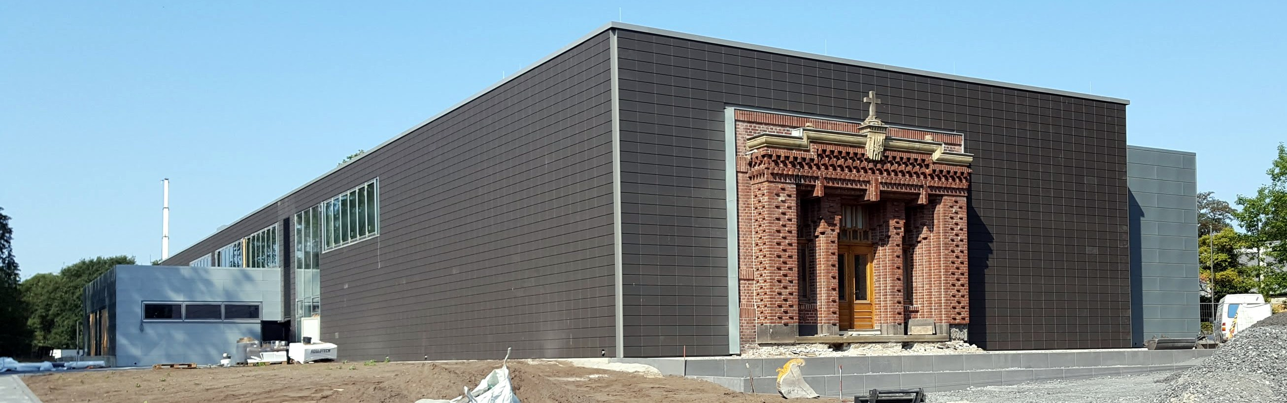 Der Neubau am Arnold-Janssen-Gymnasium in Neuenkirchen-St. Arnold während der laufenden Bauarbeiten im Juli 2018 mit denkmalgeschütztem Portal des abgerissenen Missionshauses.